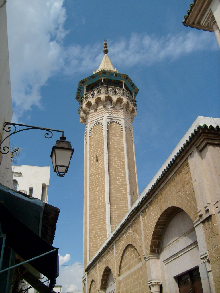 Minaret de la mosquée Hammouda-Pacha dans la médina de Tunis (Tunisie)